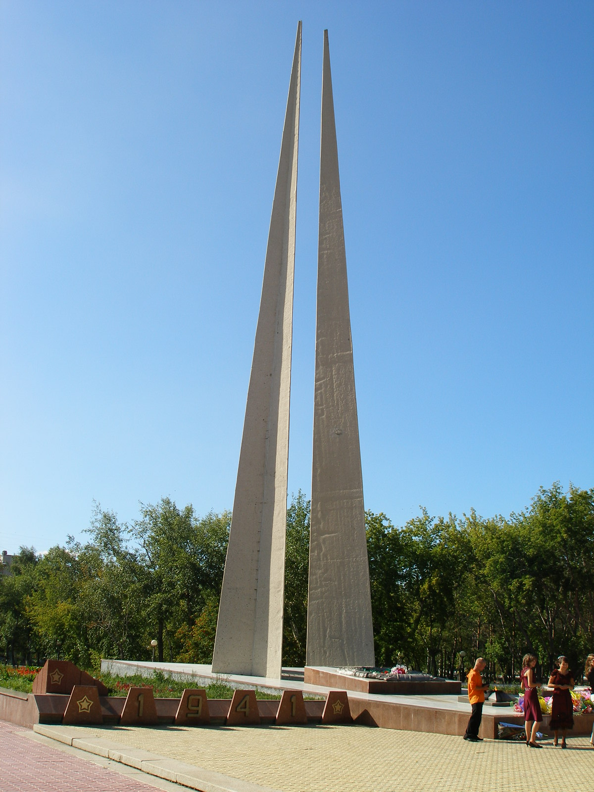 Город Павлодар, Казахстан. Обелиск Славы у Вечного огня в парке Победы.